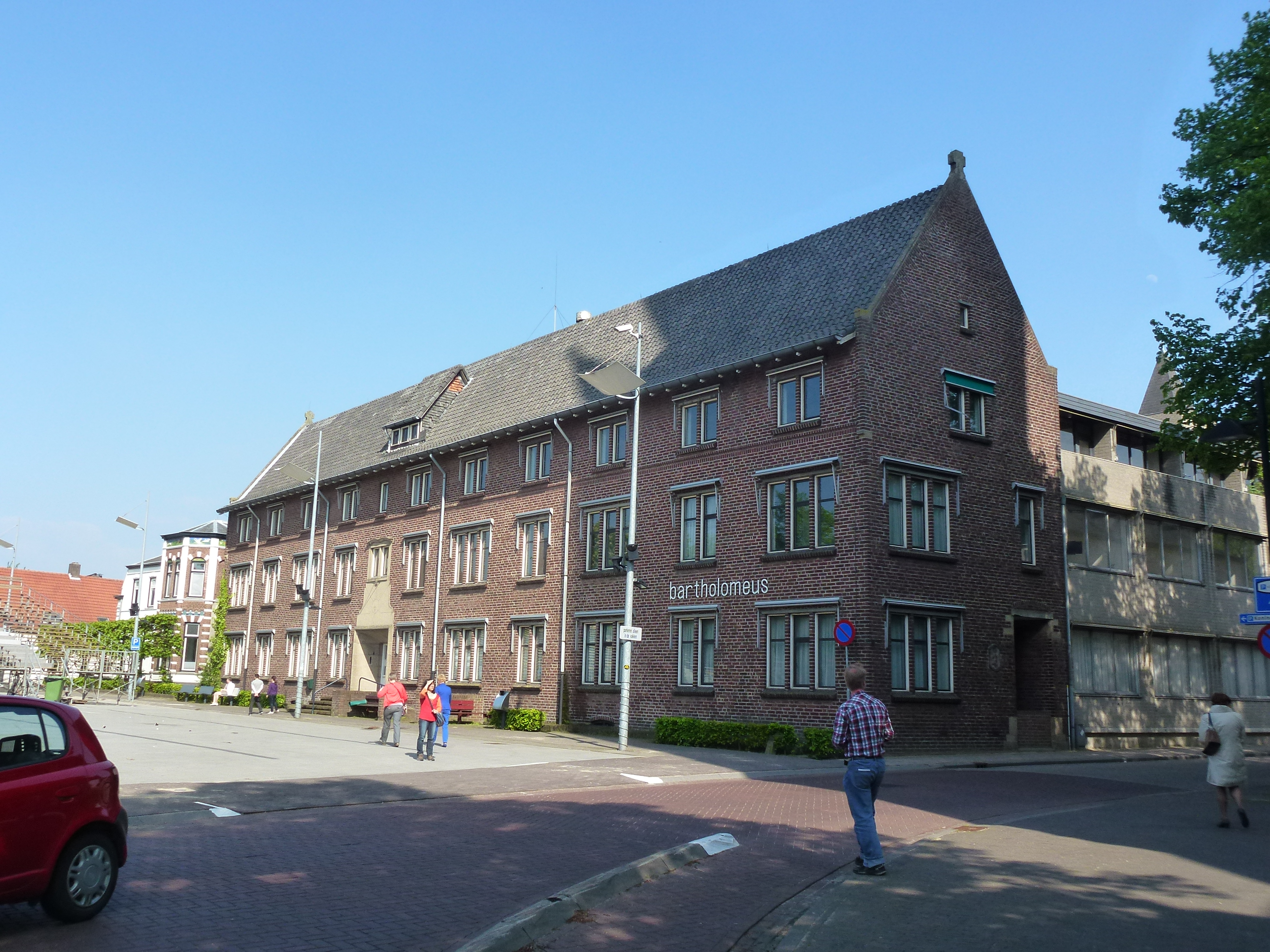 Huize Bartholomeus, Koningsplein 1, Asten